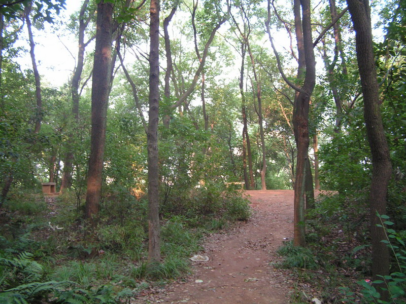 马王堆。